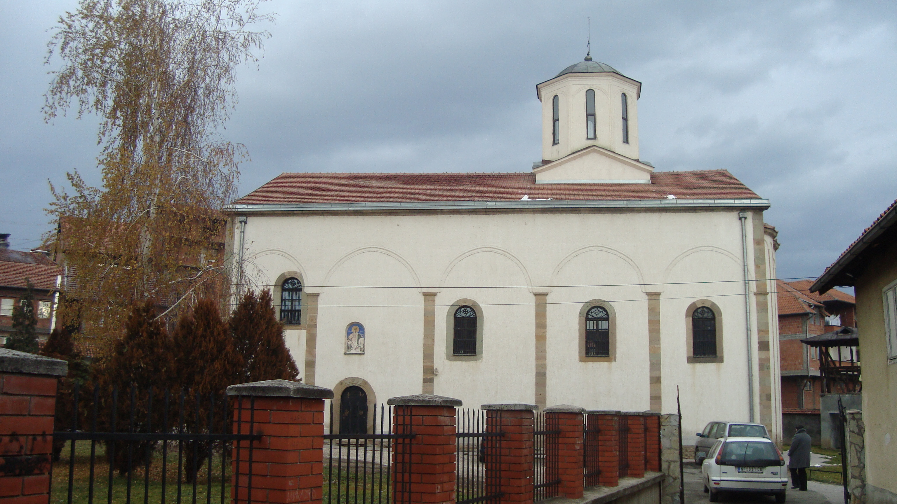 Црква Светог Николе, Нови Пазар, поглед са јужне стране, изграђена 1871. године.